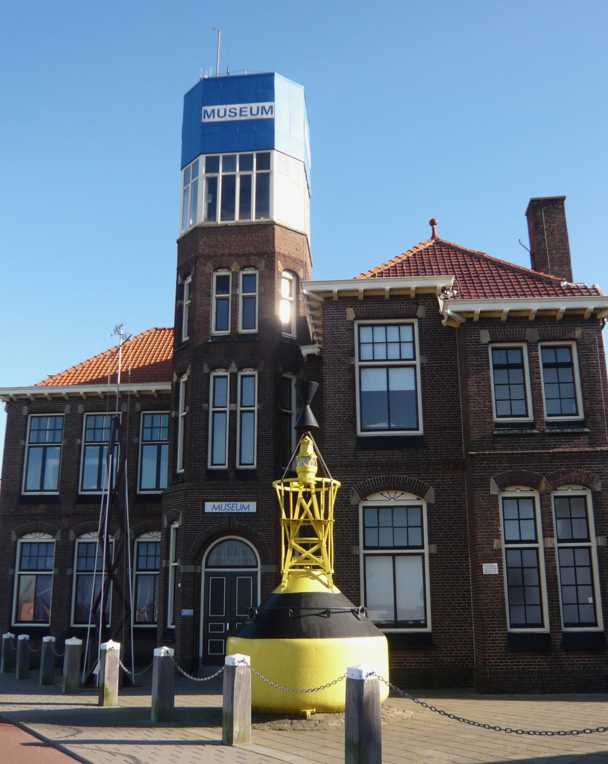 IJmuider Zee- en Havenmuseum 'de Visserijschool', Havenkade 55, IJmuiden